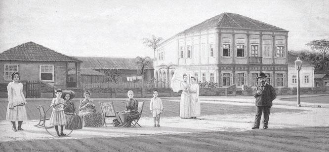 Em aquarela da Fazenda Santa Genebra, o Barão Geraldo de Rezende e sua família. Acervo do MIS - Campinas-SP.